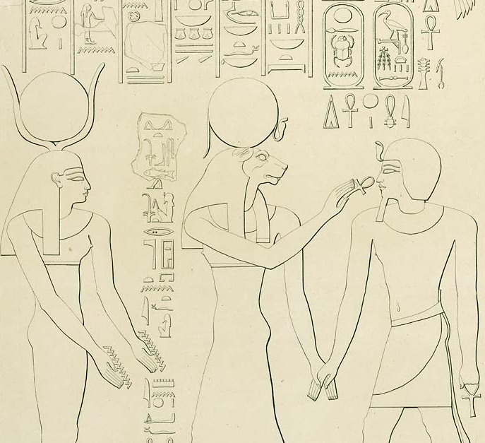 Thutmosis II. vor Sachmet und Hathor (Karnak, südlicher 3. Pylon)